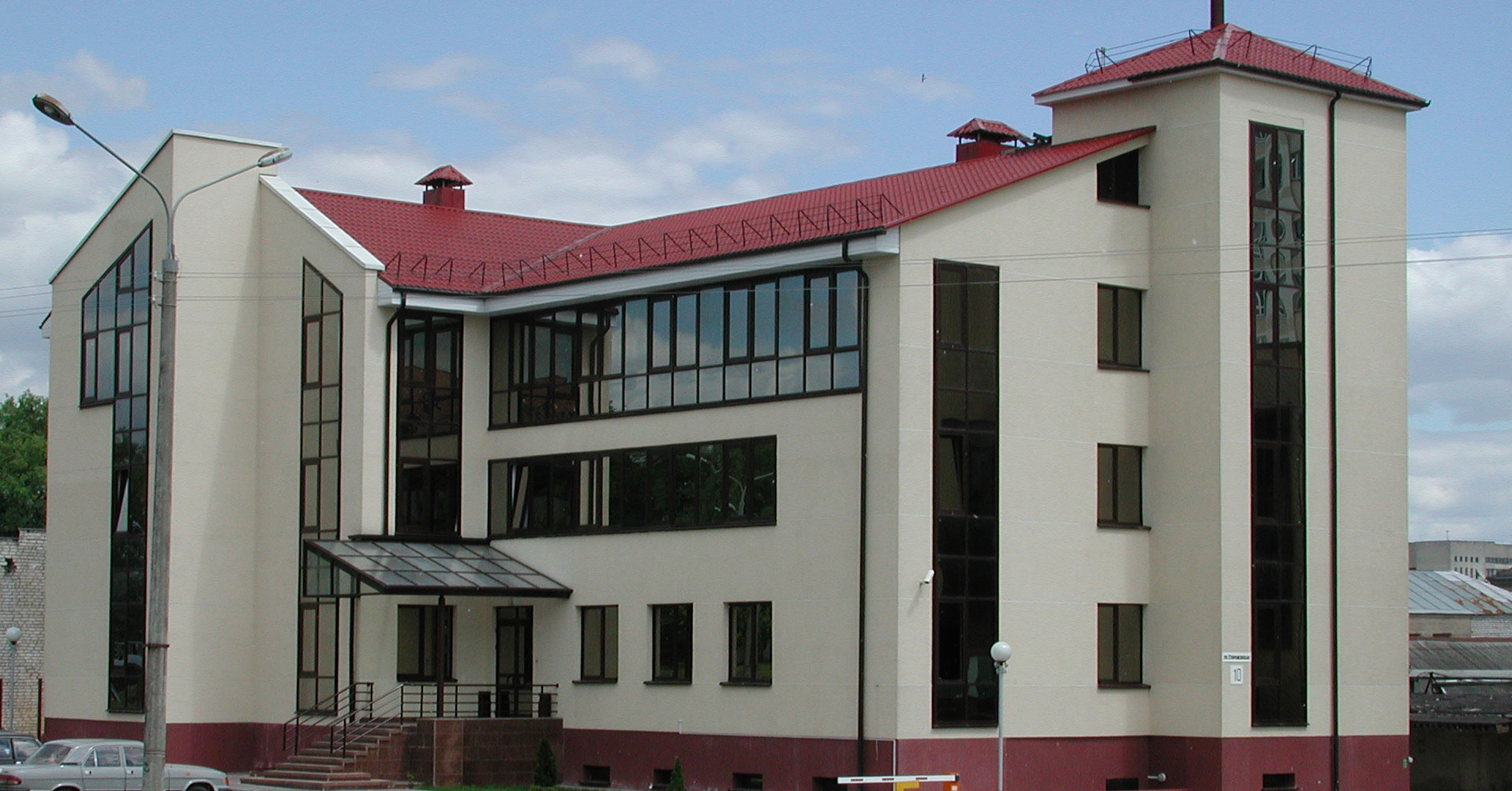 Снегодержатель на административном здании. Здание Белтопэнерго, г. Минск, ул. Сторожевская, 10